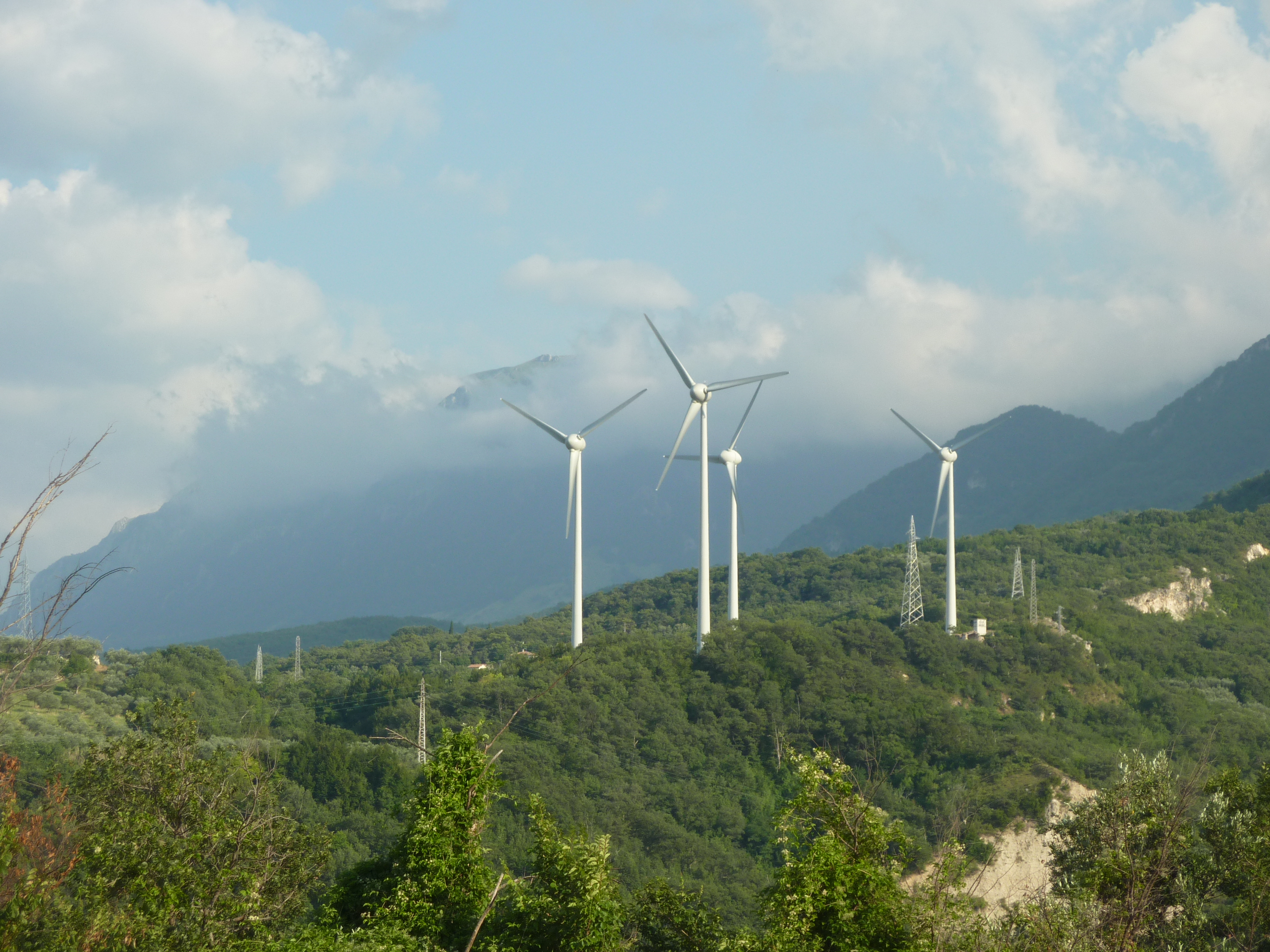 Parco eolico di Tocco da Casauria (PE)